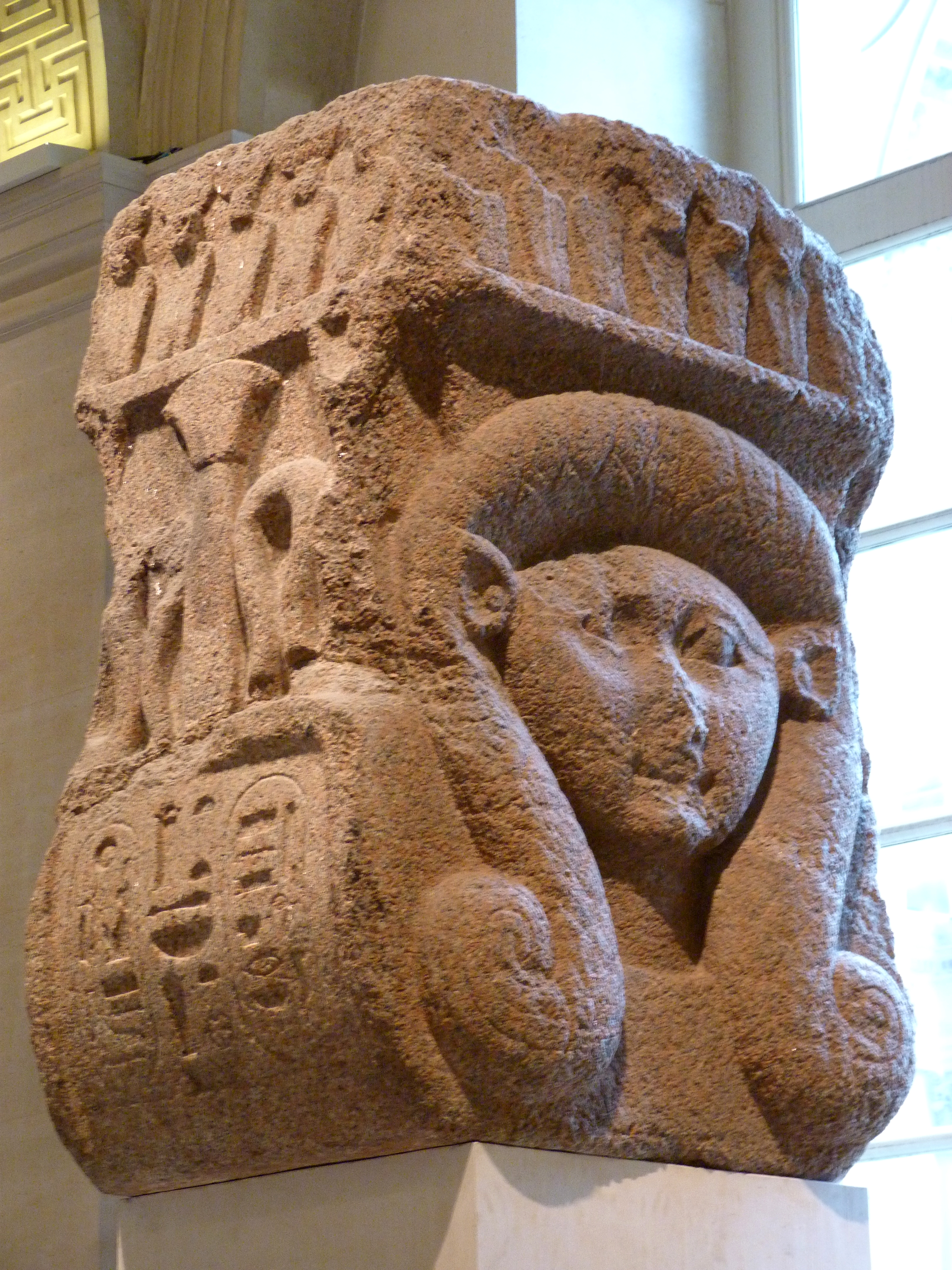 Grand chapiteau de colonne en granite rose décoré d'une tête de la déesse Hathor, règne d'Osorkon II (-874 / -850), ruines du temple de Bastet à Bubastis, poids 7,3 t. - Chapiteau hathorique provenant du grand hall jubilaire d'Osorkon II à Bubastis - XXIIe dynastie - Musée du Louvre, salle 12, n°Inv E10590